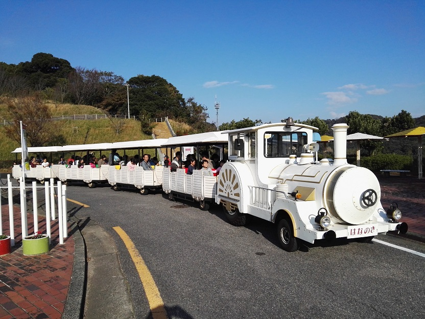 The Land Train at Aichi Kodomo-no-Kuni